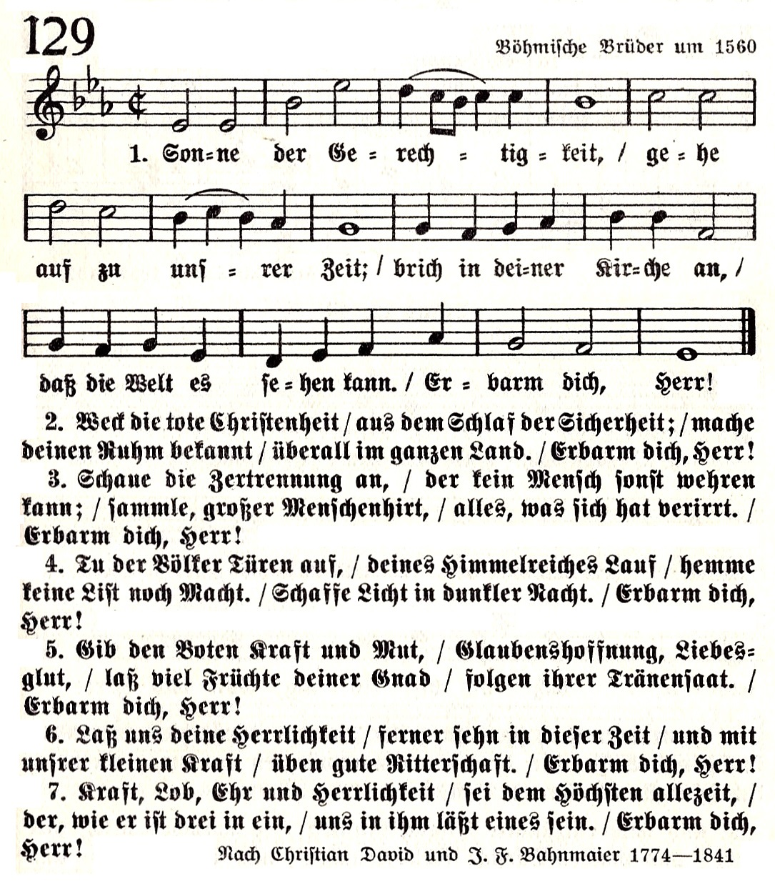 Sonne der Gerechtigkeit, Fassung 1932